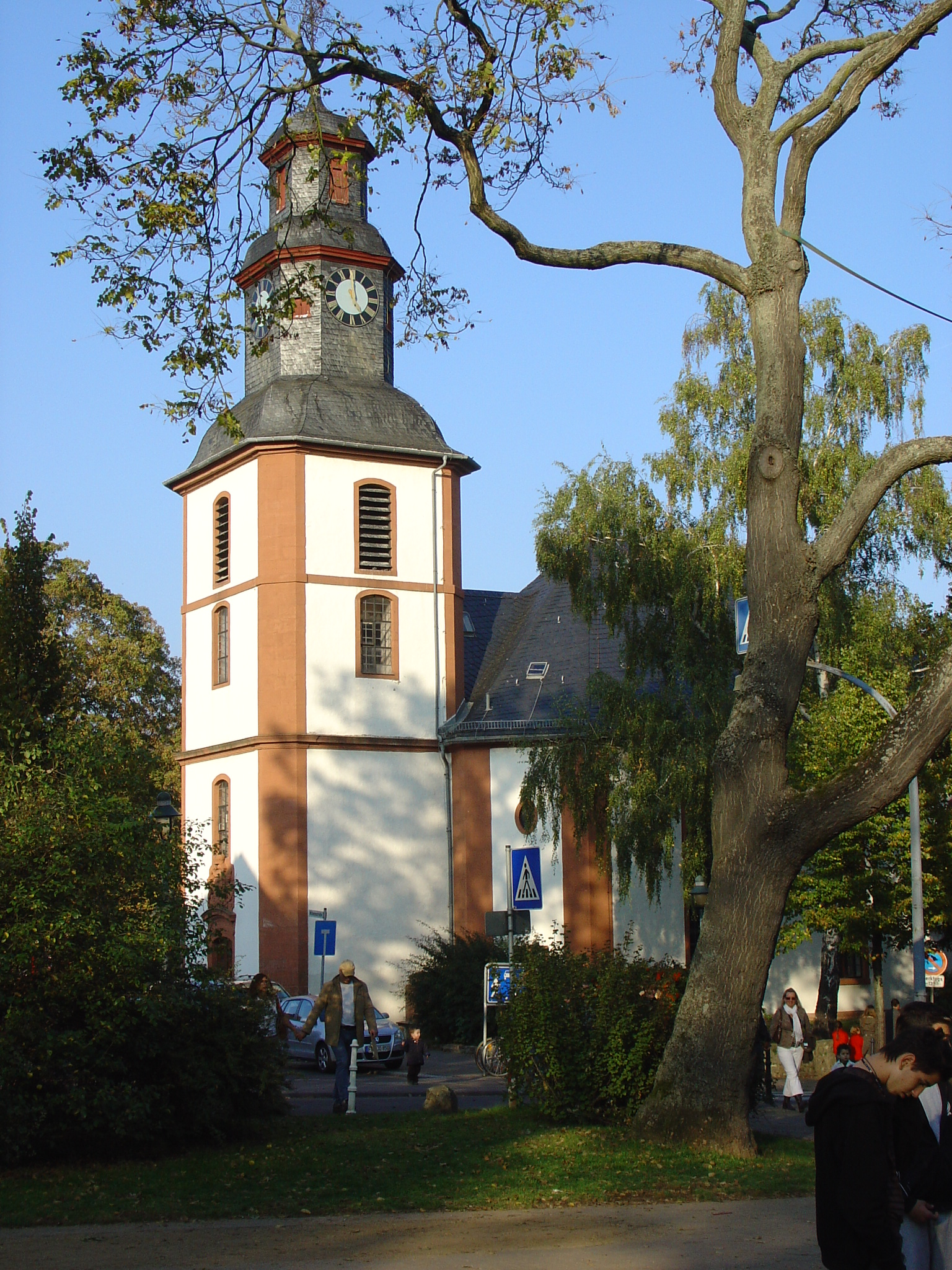 Wilhelmskirche in Bad Nauheim, Germany